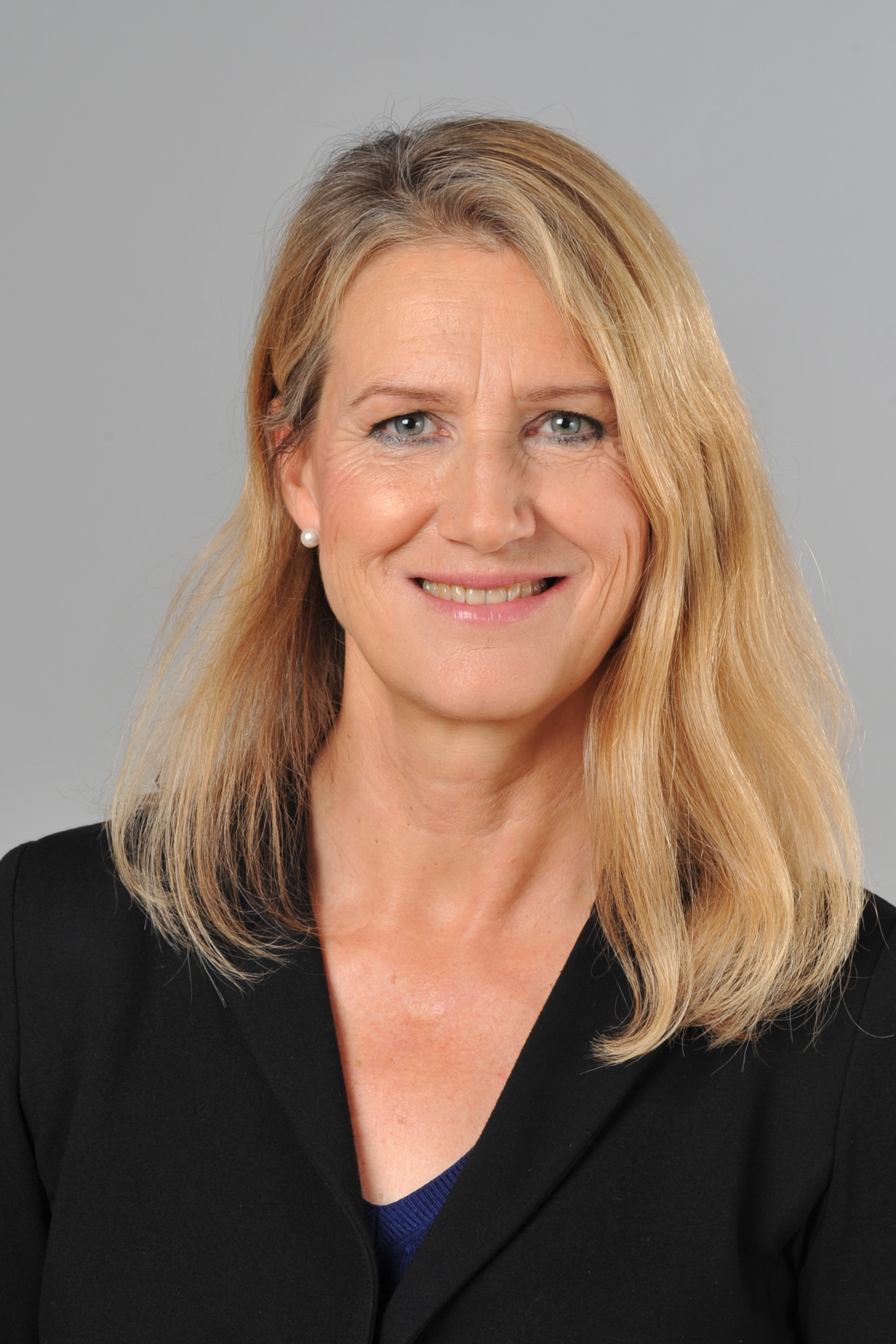 Landtagsprojekt Nordrhein-Westfalen 27. - 29. November 2013 Andrea Asch